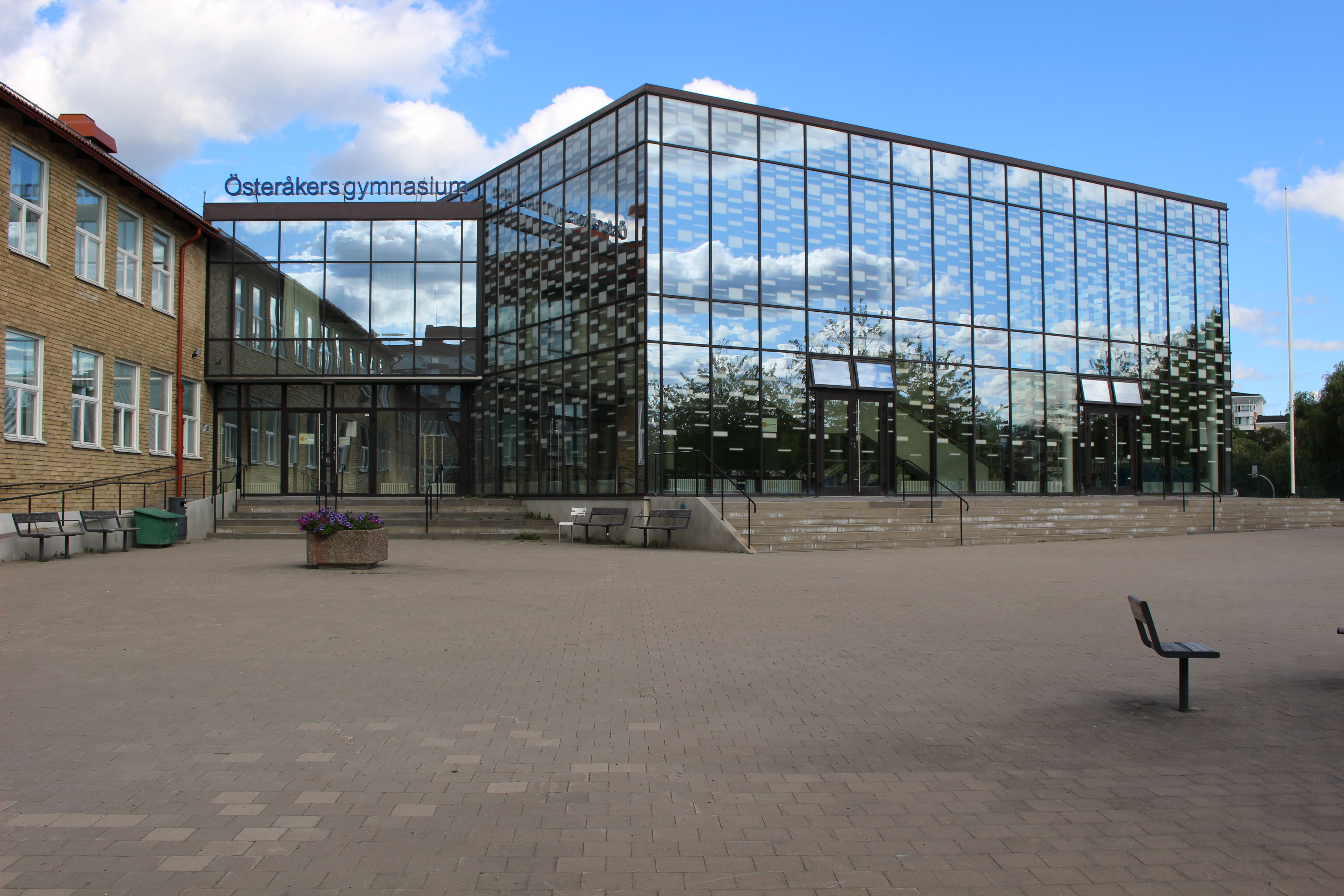 Österåkers gymnasium.